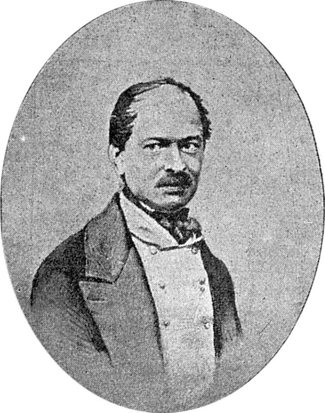 Федотов Павел Андреевич. С фотографии 1850-х годов.